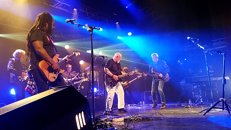 Alice Botté et sa "brûlée" + CharlElie Couture + Karim Attoumane